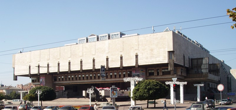 Budova opery v Charkově, Ukrajina